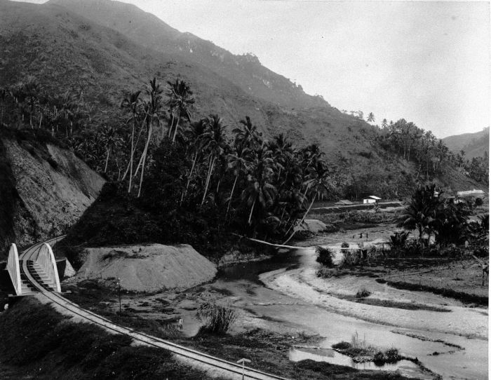 Foto. Landschap met gezicht op het station van Siloengkong, Sumatra`s Westkust